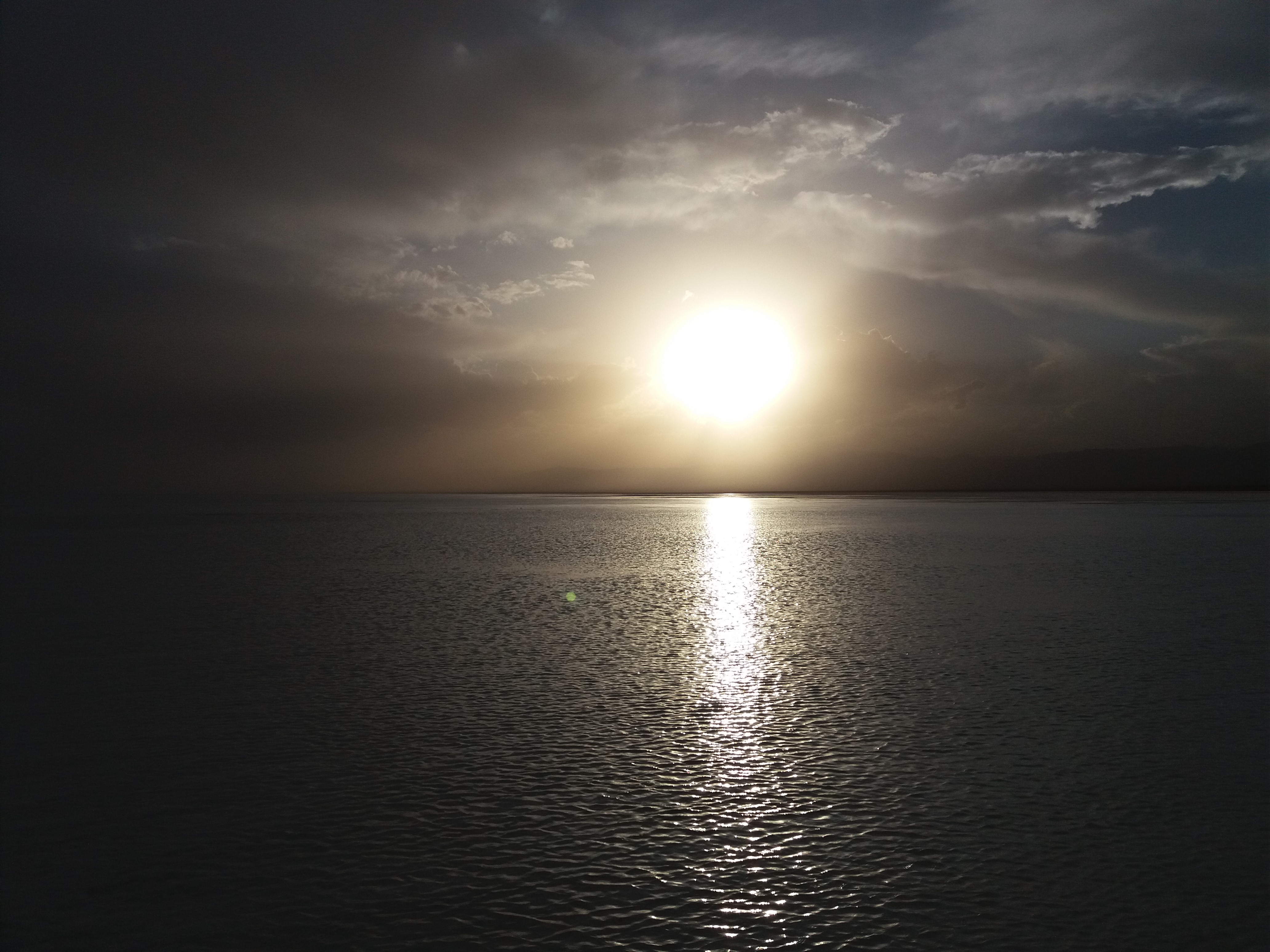 دریاچه کویر نمک بردسکن